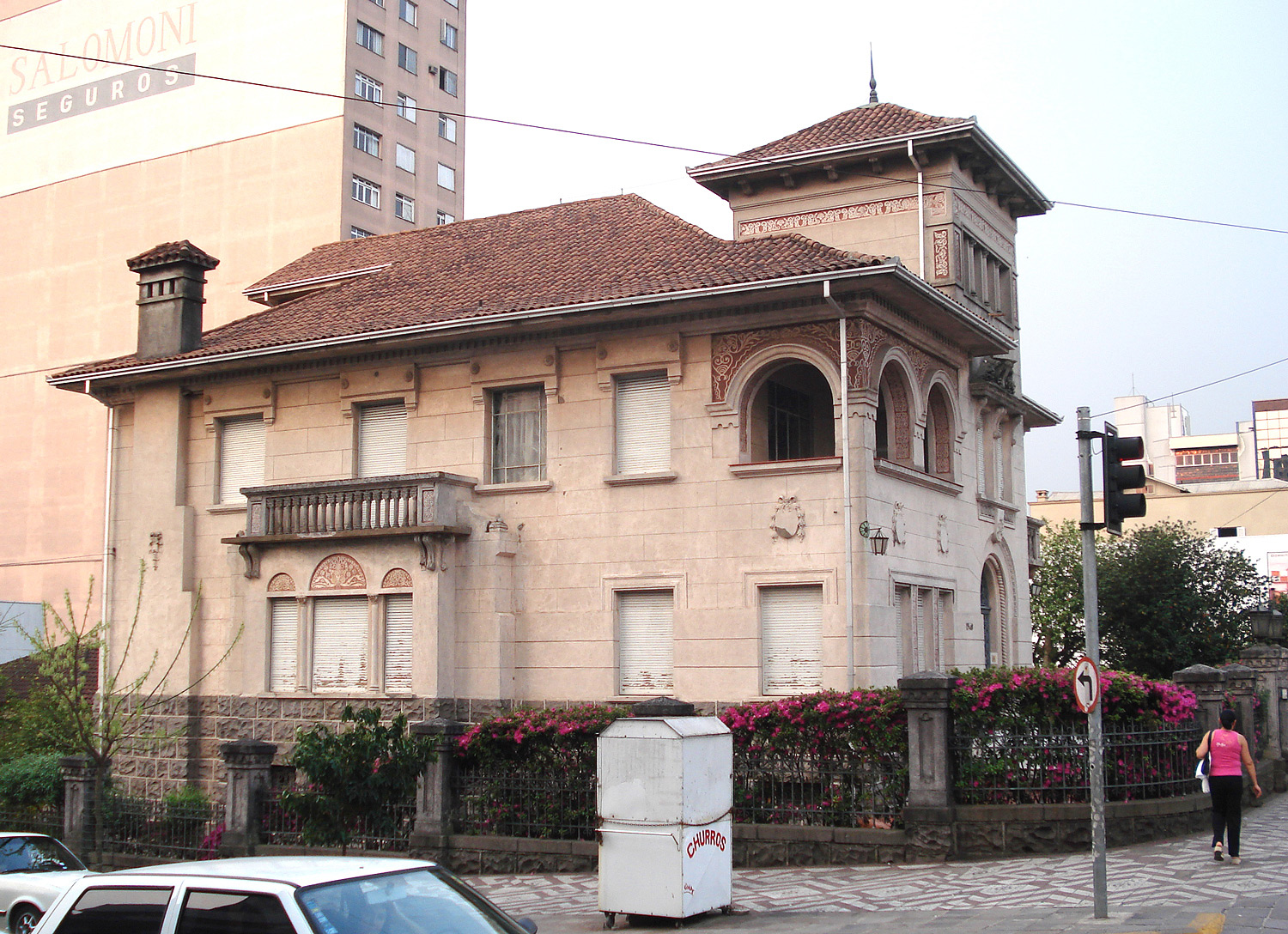 Palacete Eberle, um prédio histórico de Caxias do Sul,Brasil.